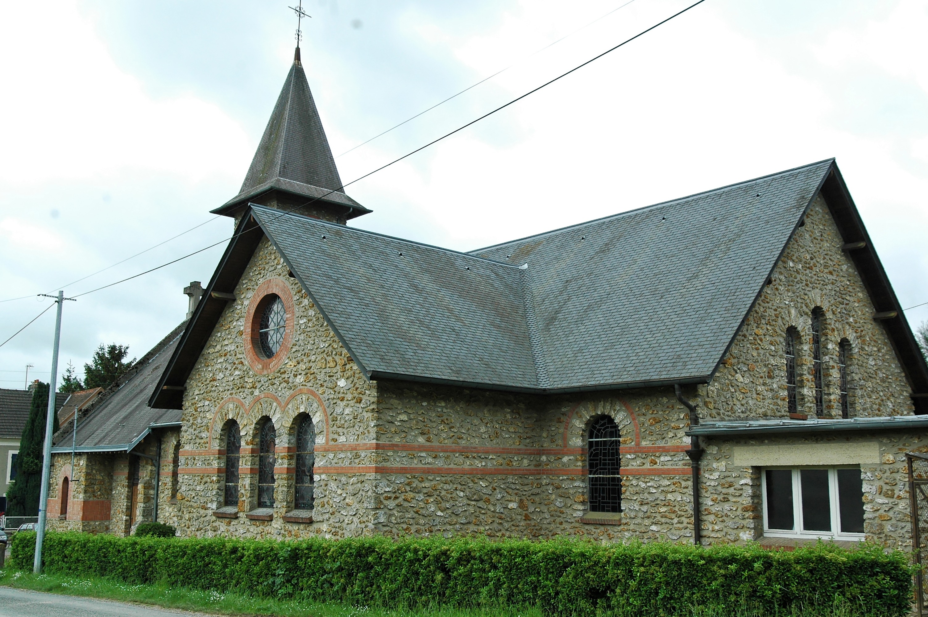 Église de Jaulgonne.